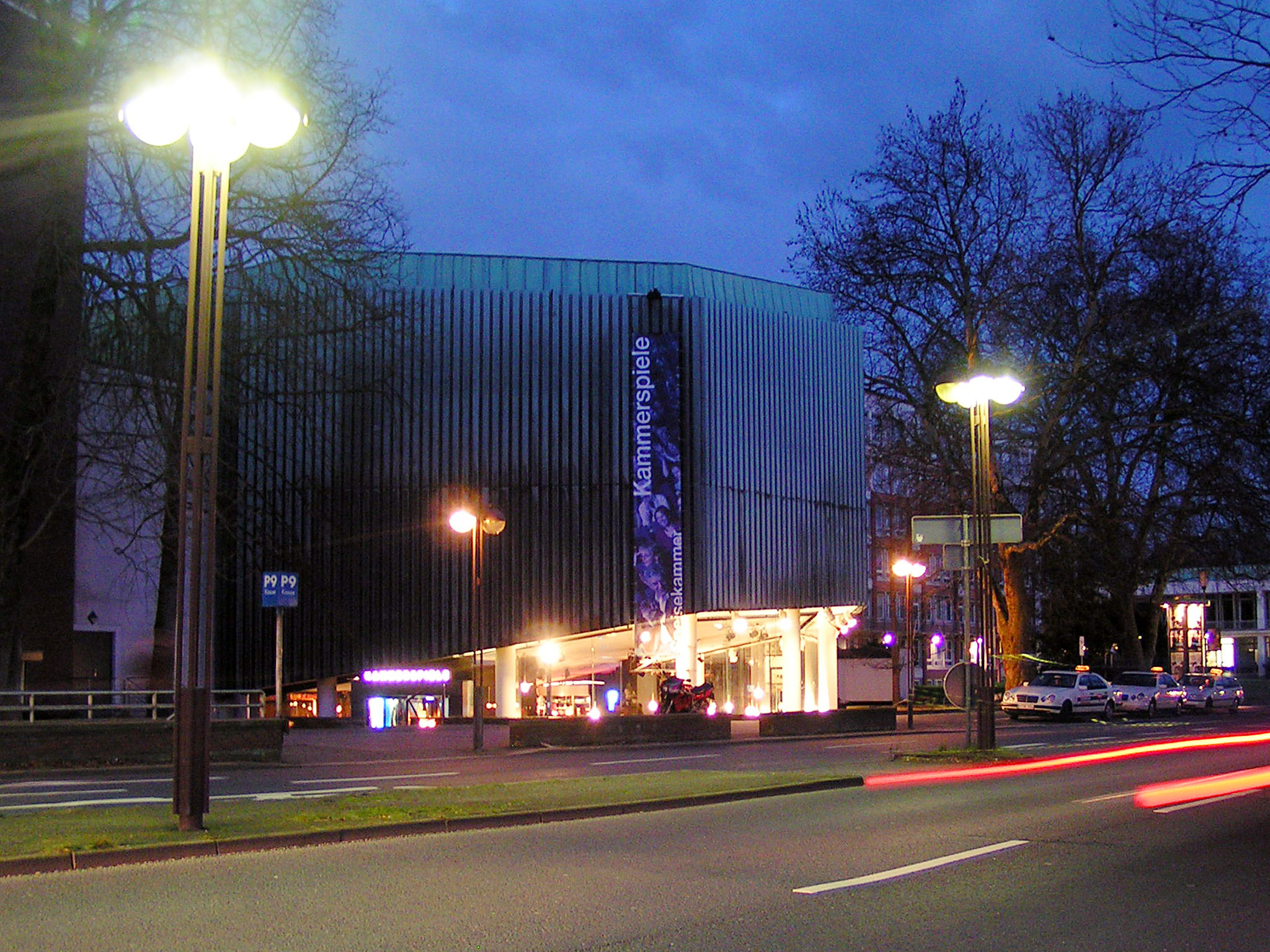 Die Kammerspiele des Schauspielhauses Bochum auf der Westseite des Schauspielhauses zur Königsallee gelegen in der Dämmerung The intimate theatre of Bochum Date: February 2007, Bochum, Germany Author: Maschinenjunge Licence: cc-by-sa-2.5